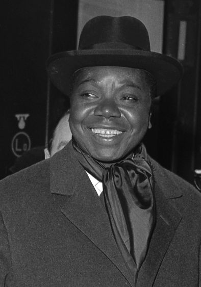 Gare Matabiau. 26 Février 1963. Vue de Moïse Tshombe, homme politique congolais, sur les quais de la gare.